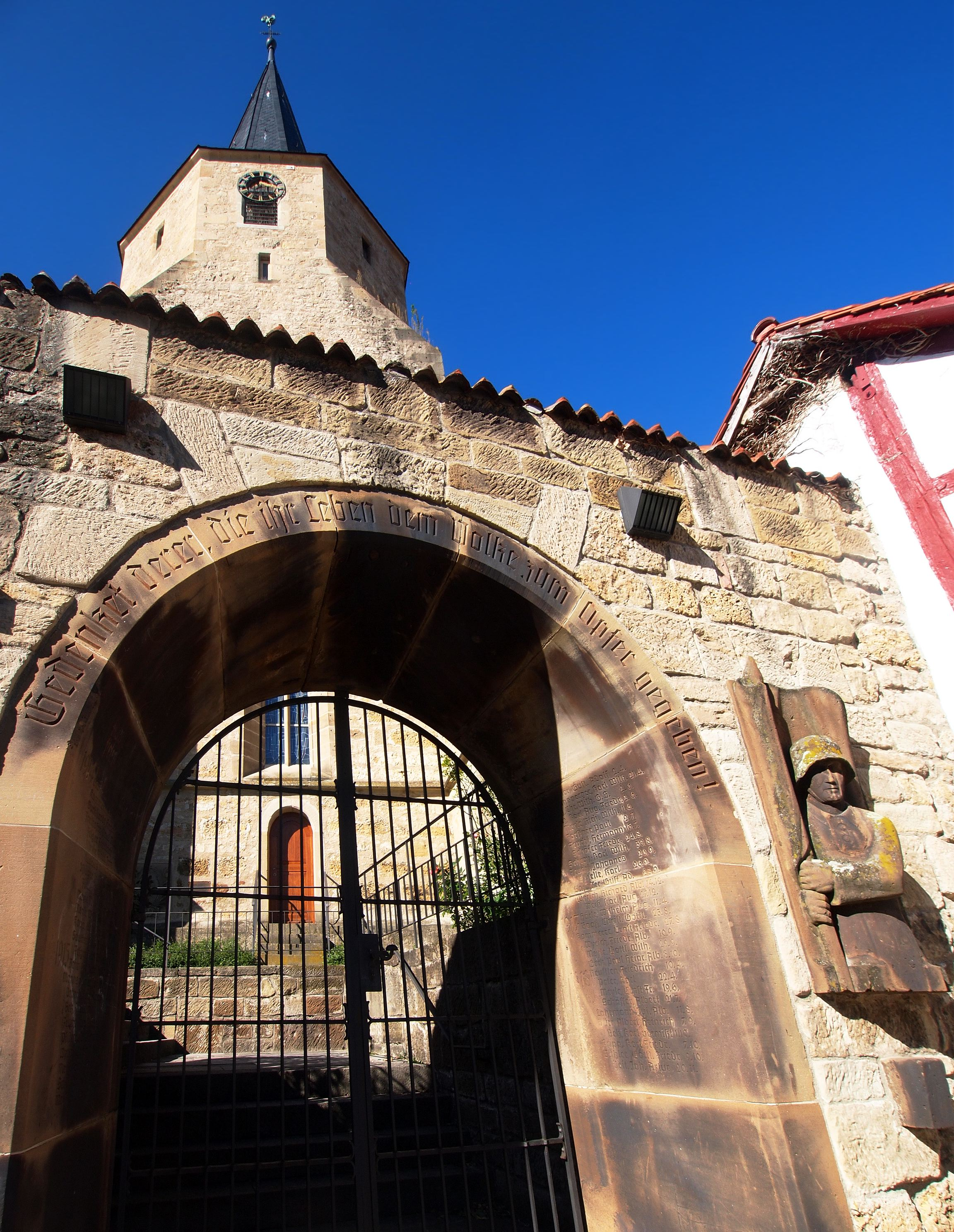 Gefallenendenkmal von 1938 für den I. Weltkrieg an der Kirche in Tamm Gedenket derer, die ihr Leben dem Volke zum Opfer gegeben!